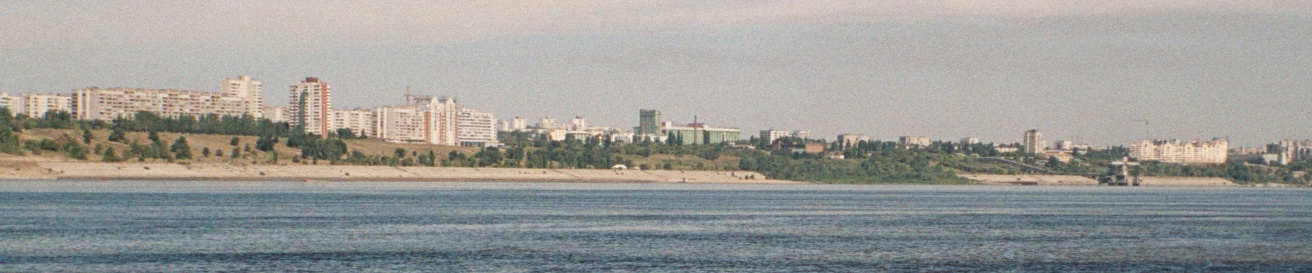 eo Aspekto de urbo Volgogrado de insulo cxe mezo de rivero Volga (2005). ru Вид Волгограда с острова у середины Волги (2005). La fonta bildo de cxi tiu bildo estas ankaux en mia propra retpagxaro [1] Mi, auxtoro de la bildo, permesas al cxiuj uzi gxin kun cxi tiuj kondicxoj